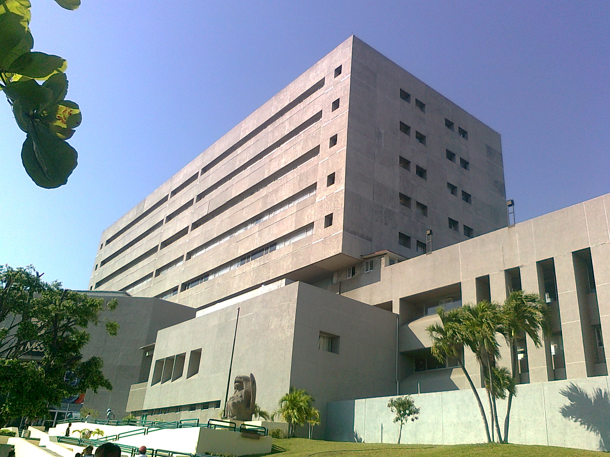 Vista del Hospital General Vicente Guerrero del Instituto Mexicano del Seguro Social en Acapulco, Gro.